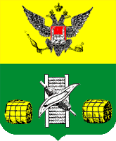 Герб Бердичева